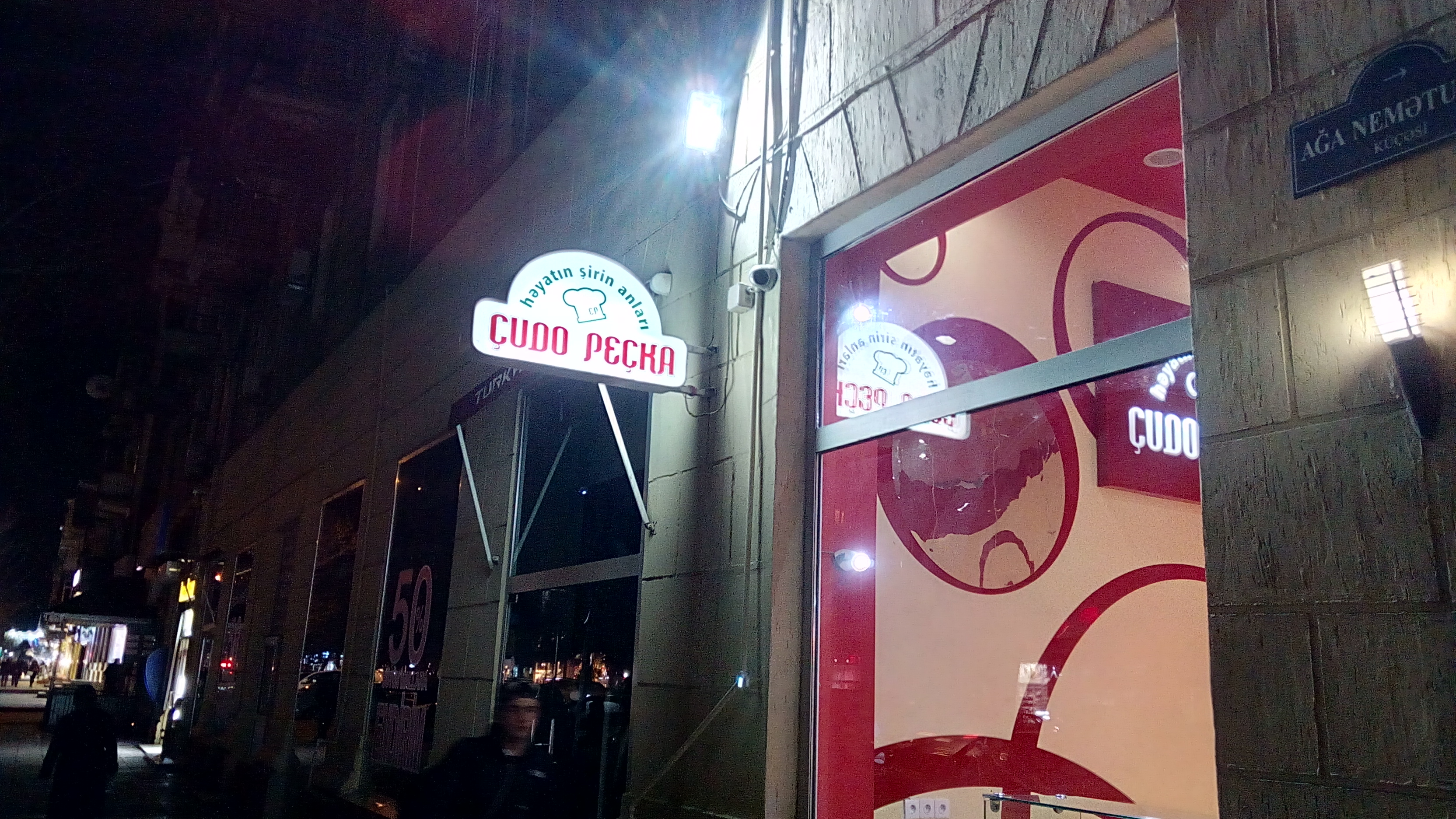 Ağa Nemətulla küçəsindəki Çudo Peçka